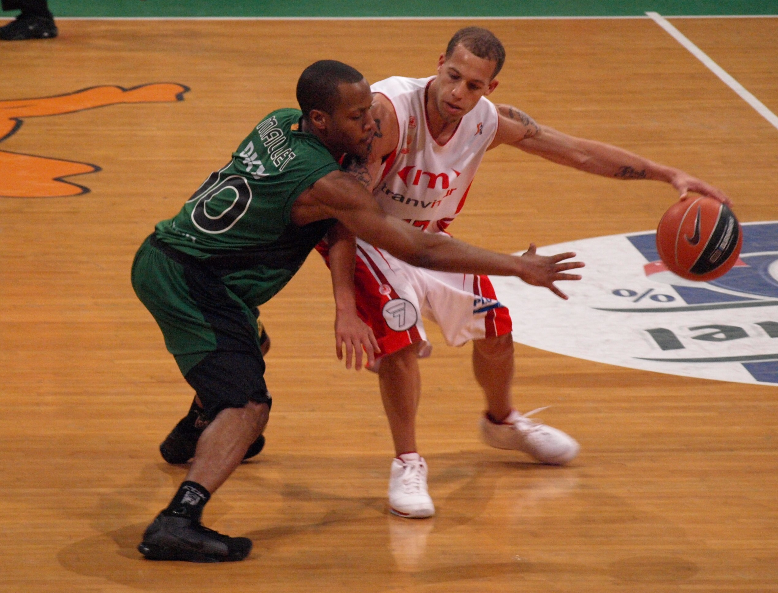 Chris Thomas del CB Murcia, defendido por Demon Mallet del DKV Joventut en el partido de la temporada regular de la liga ACB 2008-09 que ambos clubes disputaron en el Pabellón Olímpico de Badalona en enero de 2009.